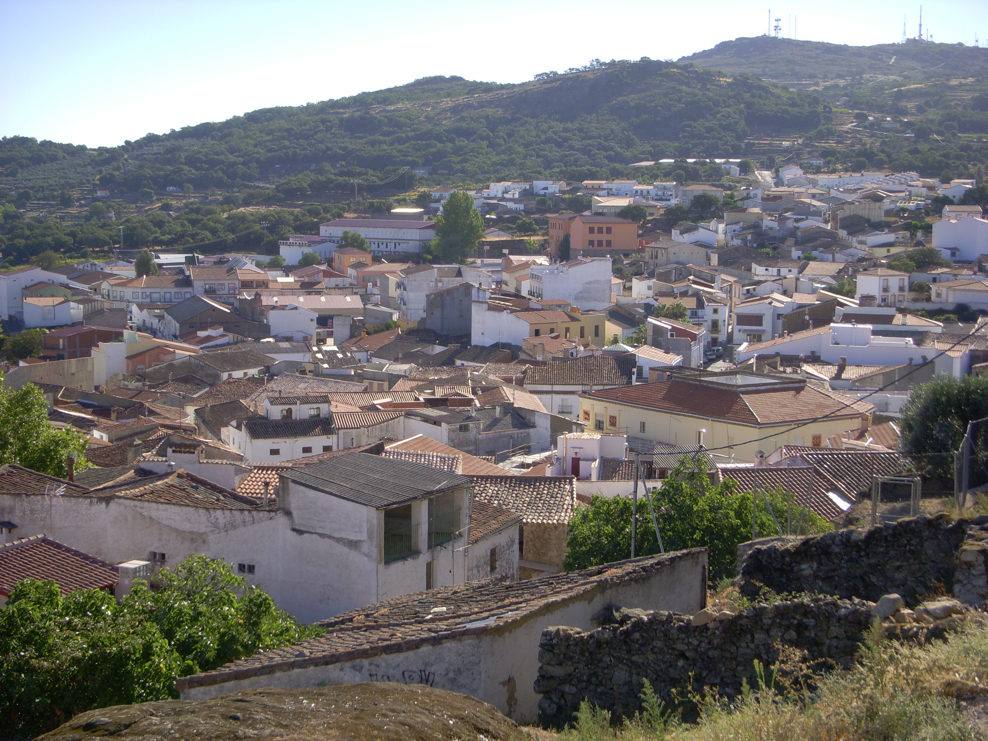 El Castillo está coronado por el Monte Viejo (Montancil o Monte Tances). Sus vinos y jamones ibéricos tienen fama reconocida. Considerables pendientes y frecuentes quiebros de sus calles. Situación: 39.225658 -6.154807 Rumbo: 214 SO Codigo postal: 10170 Comarca: Comarca de Montánchez. Mancomunidad: Sierra de Montánchez. Pueblos cercanos: Abalá del Caudillo, Torre de Santa María, Zarza de Montánchez, Valdemorales, Almoharín, Arroyomolinos, Alcuescar, Casas de Don Antonio. Alrededores cercanos: El Quemado, Recuera, nacimiento del río Salor, el pocito, prado barbudo, el hornillo.